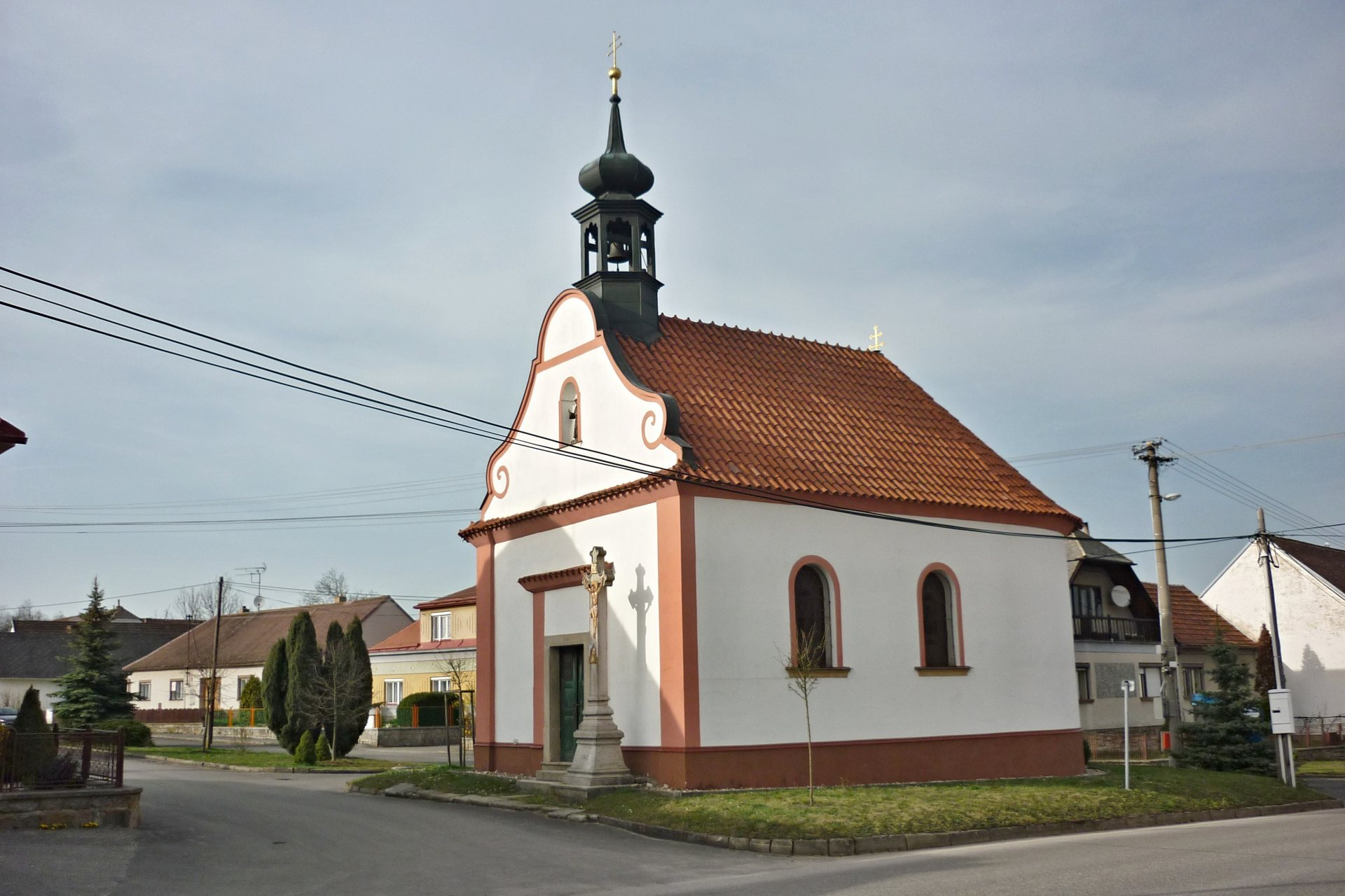 Červený Hrádek, kaplička